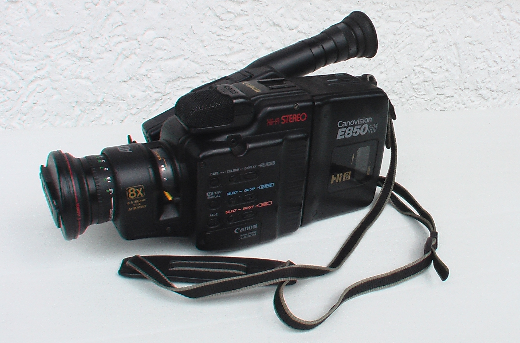 Hi8VideokameraCanonE850